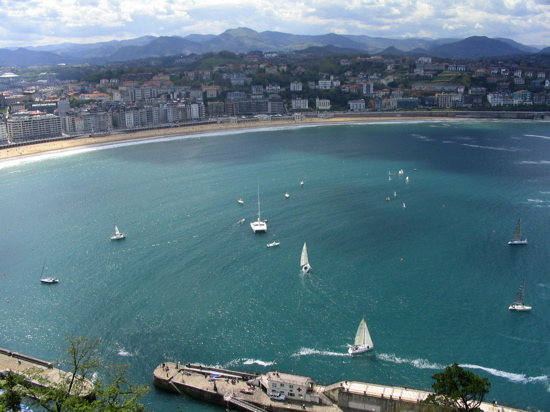 La plage de La Concha à San Sebastián. Kontxa Ondartza, en euskera.